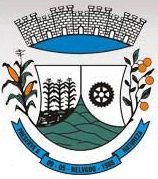 Brasão de Armas do município gaúcho de Relvado, Brasil.